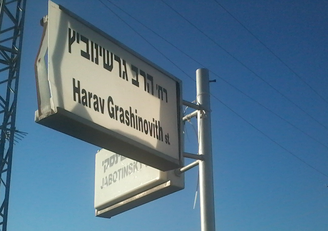 רחוב הרב גרשנוביץ בנתיבות